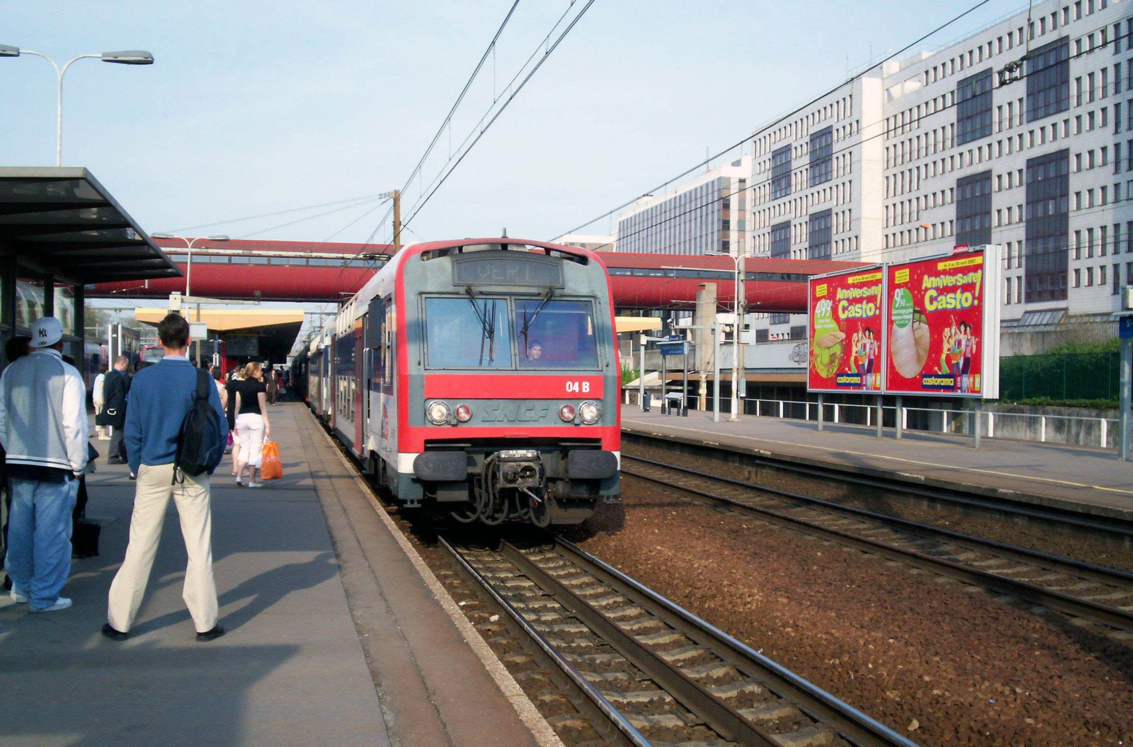 Rame Z8800 arrivant en gare de Saint-Quentin-en-Yvelines assurant la mission VERI